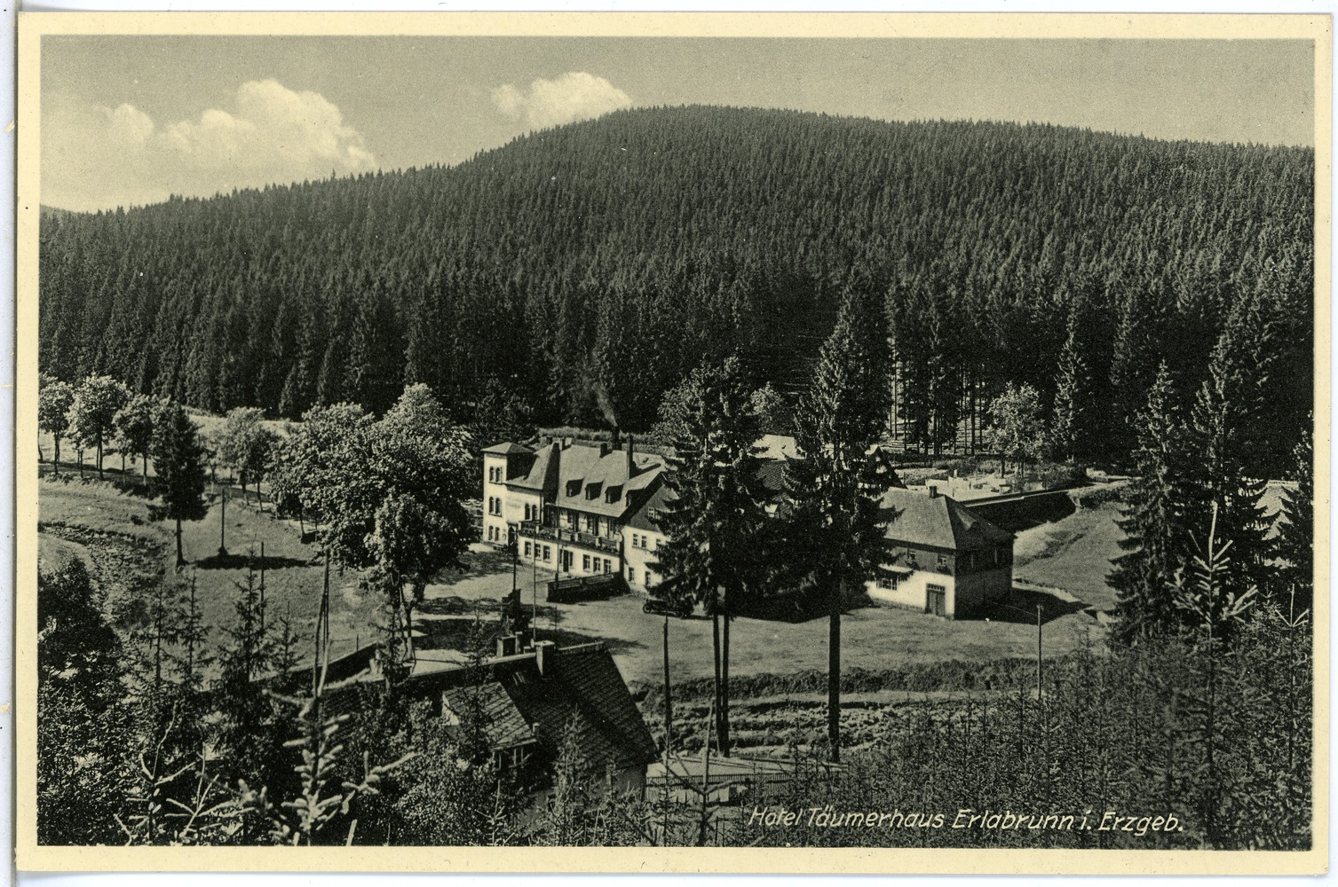 Erlabrunn; Hotel Täumerhaus This postcard is from publisher Brück & Sohn in Meißen ( postcard has a unique number 26274 and is available in a higher resolution at the publisher. This images was uploaded in a cooperation project between Wikipedians and the publisher.